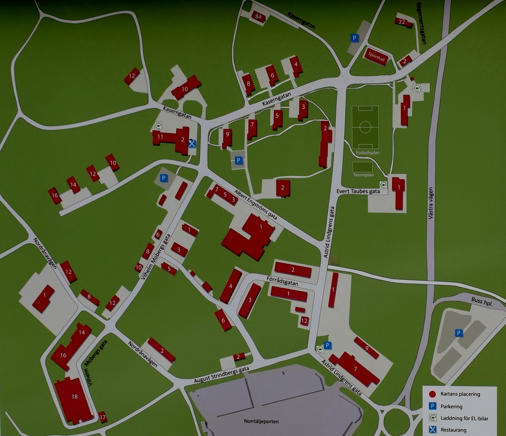 Översikts bild över före detta Roslagens luftvärnskår